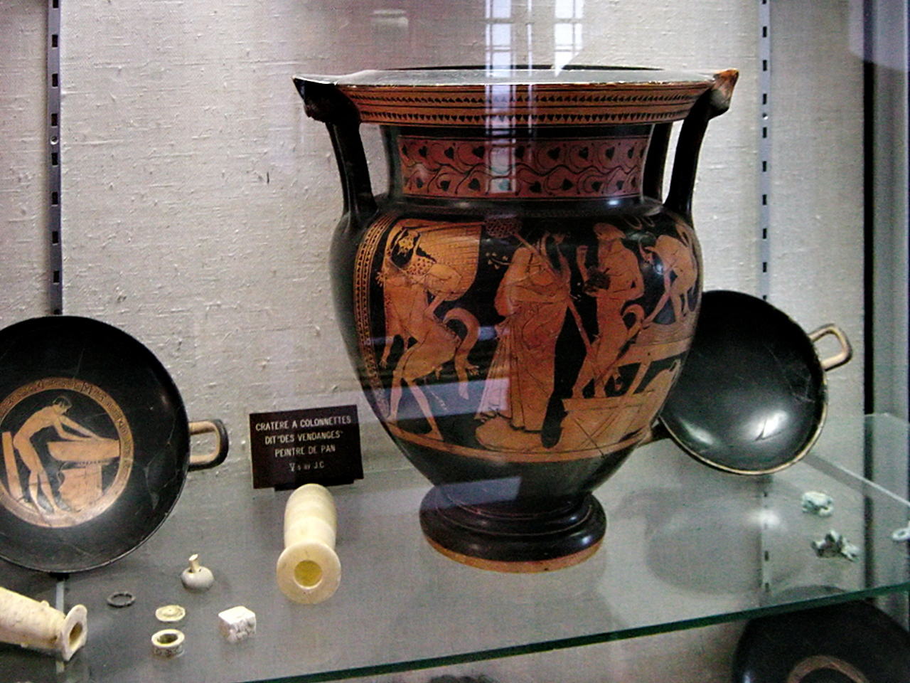 Aléria (Corsica) - Pièce exposée au musée départemental d'archéologie Jérôme Carcopino au fort de Matra